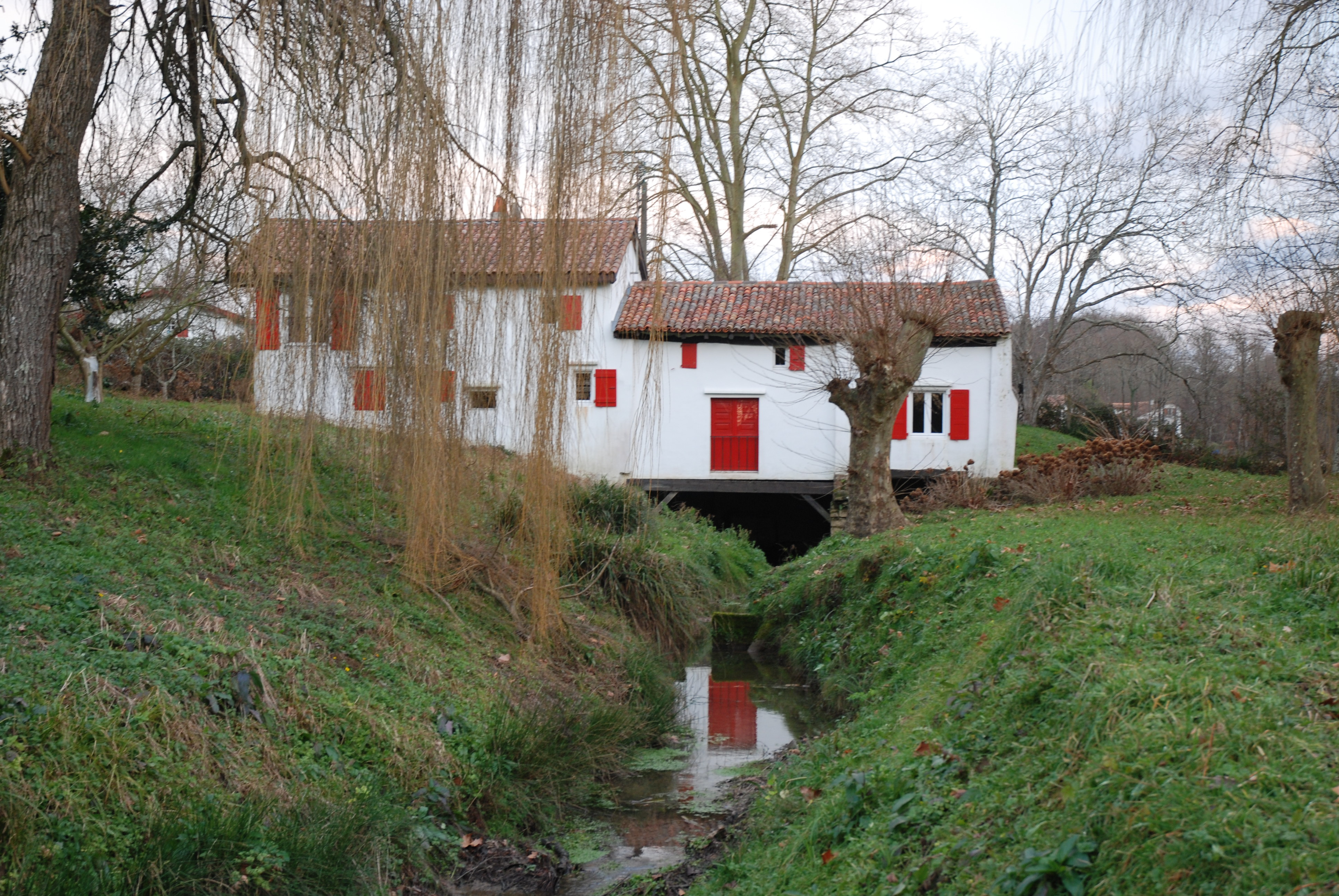 Ahetze, moulin à eau sur le